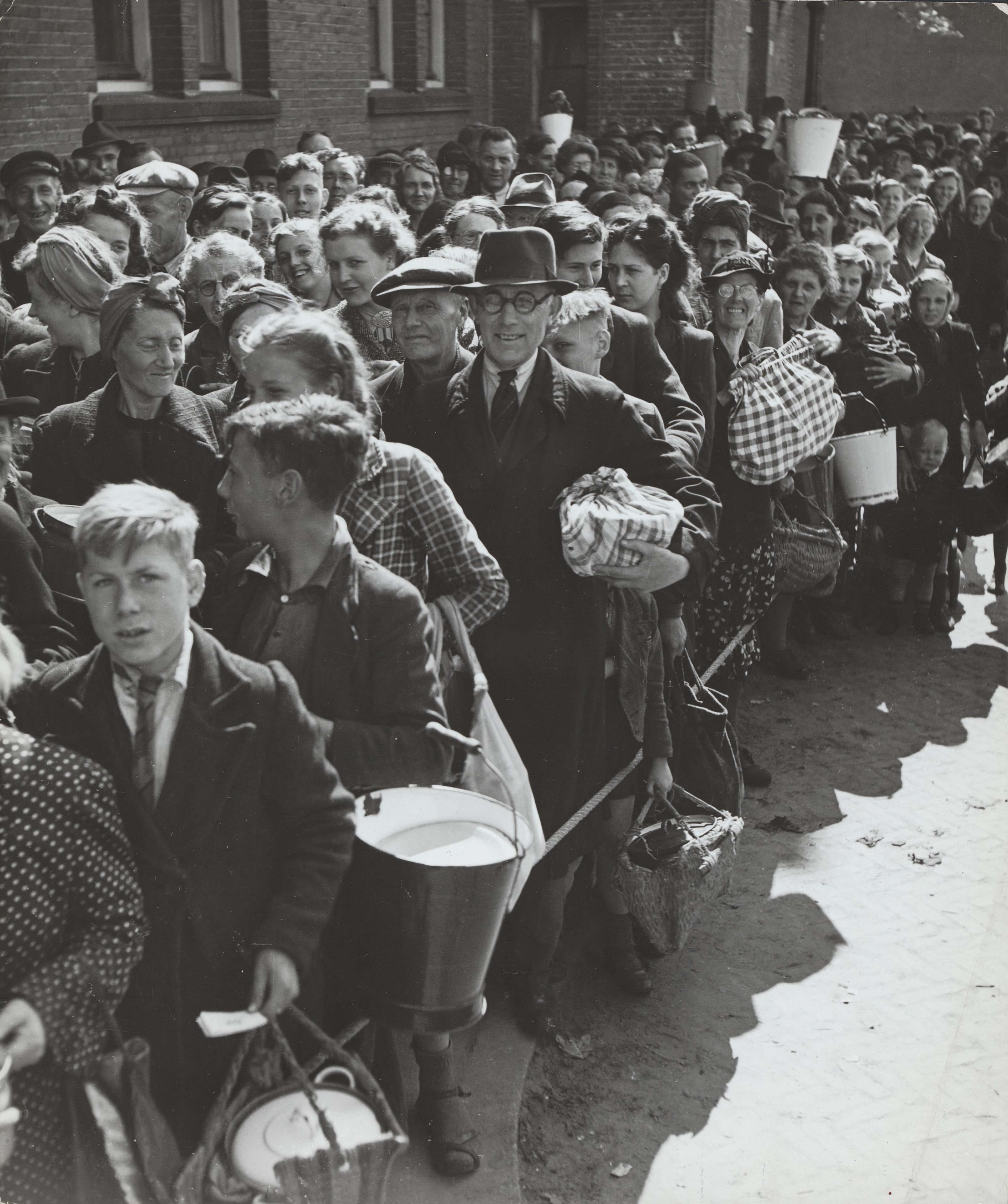 Collectie / Archief : Fotocollectie Anefo Reportage / Serie : Voedselvoorziening: Wageningen Beschrijving : Het Amsterdamse publiek koopt gretig het nieuw aangekomen voedsel Datum : 1 juni 1945 Locatie : Middelburg, Zeeland Trefwoorden : honger, voedsel, voedselvoorziening Fotograaf : Presser, Sem / Anefo Auteursrechthebbende : Nationaal Archief Materiaalsoort : Foto (zwart/wit) Nummer archiefinventaris : bekijk toegang 2.24.01.01 Inventarisnummer : 512 Bestanddeelnummer : 512_067